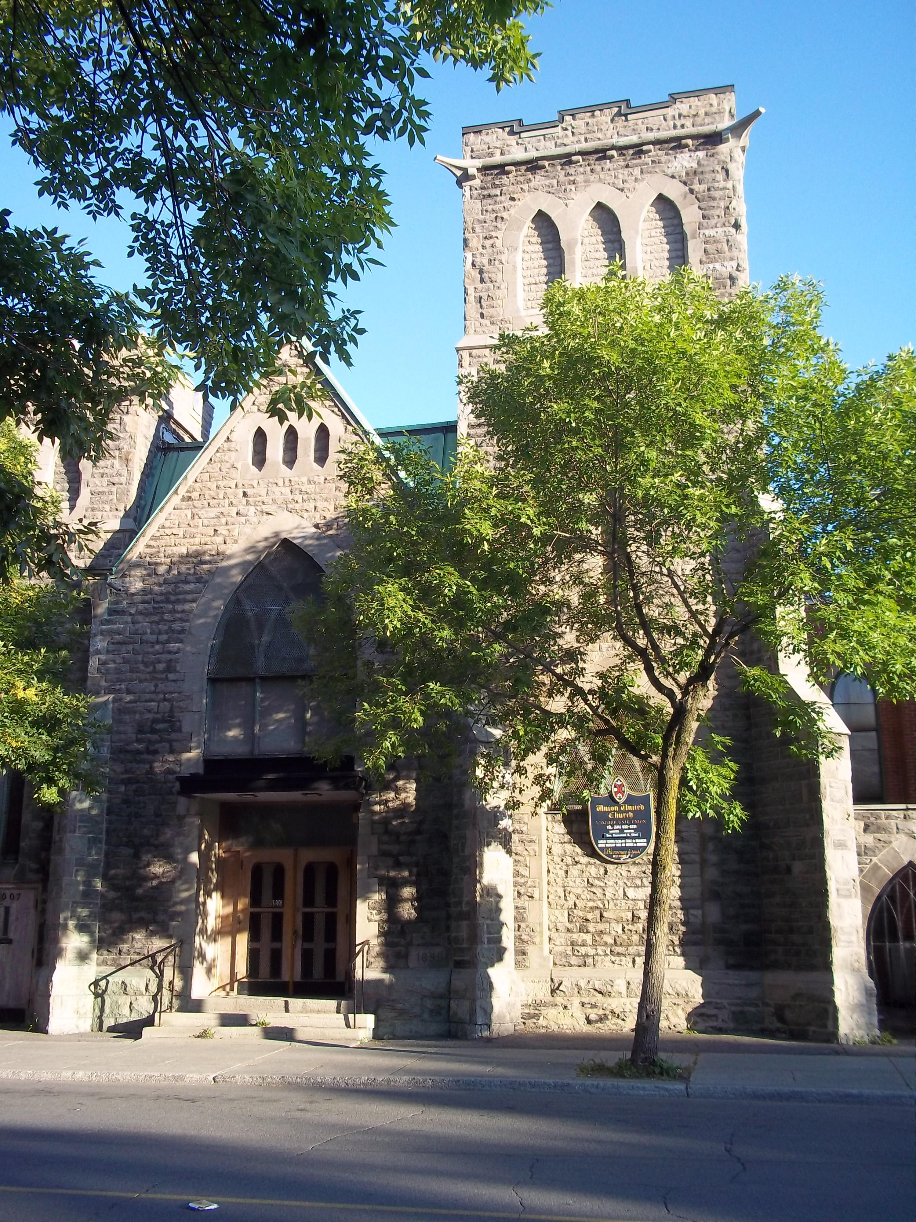 Union United Church is a congregation with open hearts and hands in the heart of downtown Montreal, 3007 Delisle Street, Montréal, Quebec, Canada.